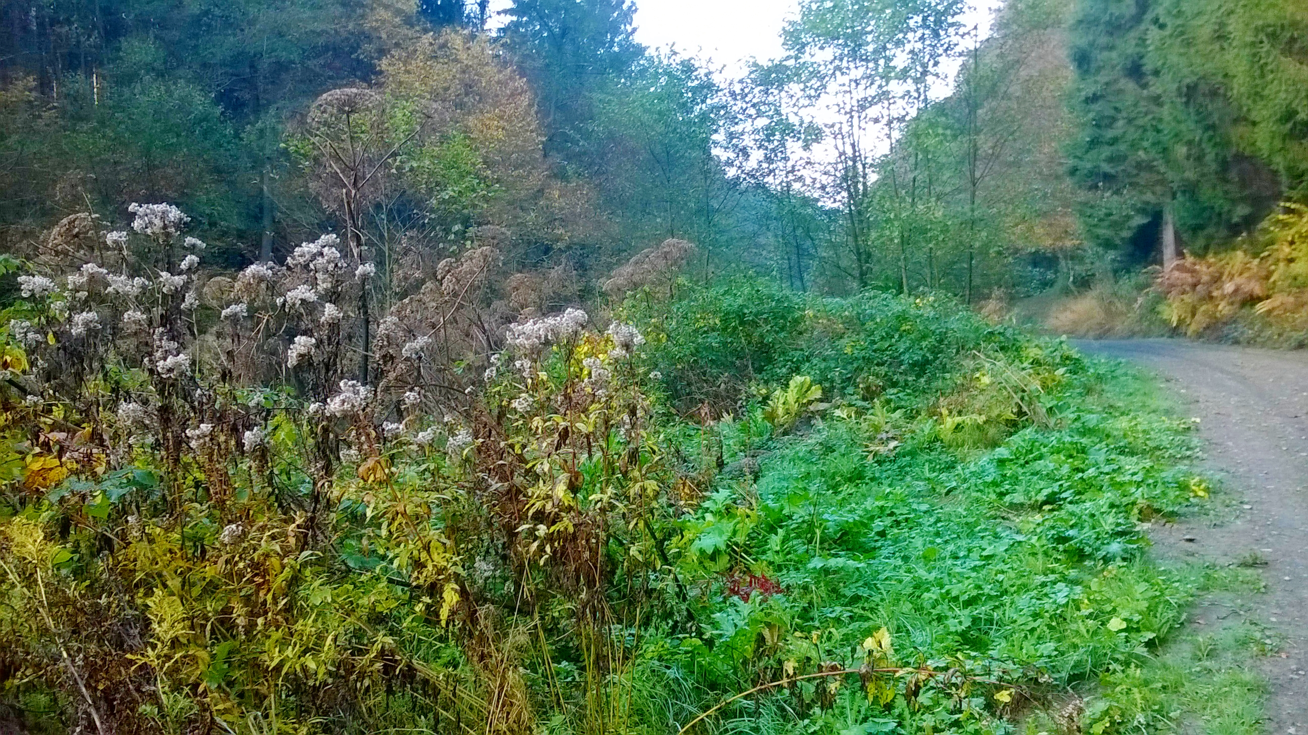 Forstwege - einzige Zugangsmöglichkeiten nach Neuenhaus (Overath); Bachtal (links) im Naturschutzgebiet „Lombachtal“ (NSG GL-074)